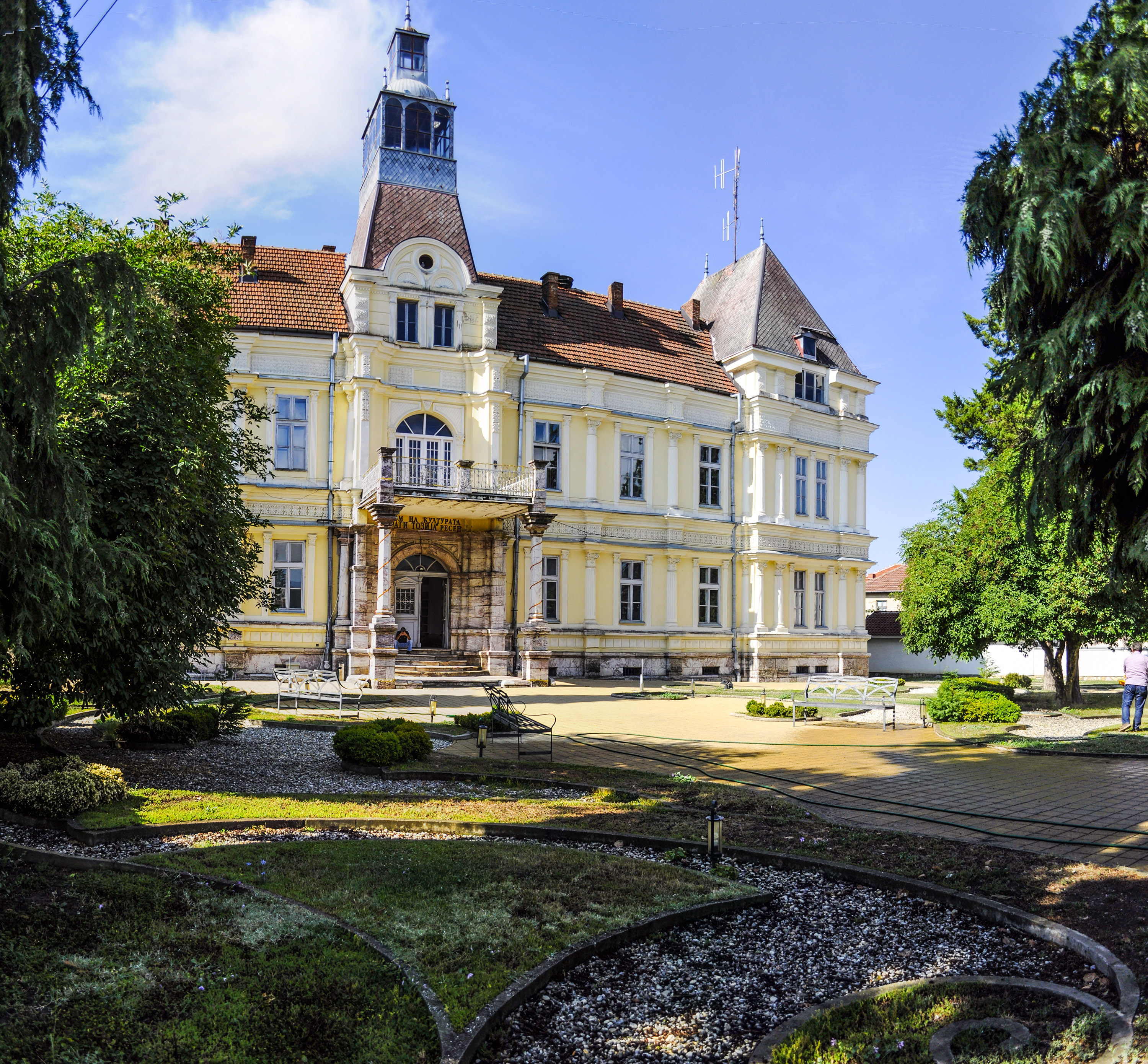 Ресенски сарај — дворец во градот Ресен е еден од најрепрезентативните примери на објекти градени во неокласичен стил во Македонија. Изграден е во француски ренесансен стил и се смета за еден од поважните примери на архитектурата од почетокот на XX век, во кои се присутни елементи и од другите европски историски стилови во архитектурата. Граден е во периодот од 1905 до 1909 година Ова е фотографија на споменик на културата во Македонија со типски код: Ова е фотографија на споменик на културата во Македонија со типски код: F01This is a a photo of a cultural monument in North Macedonia with type id: F01 This is a a photo of a cultural monument in North Macedonia with type id: Ова е фотографија на споменик на културата во Македонија со типски код: F01This is a a photo of a cultural monument in North Macedonia with type id: F01